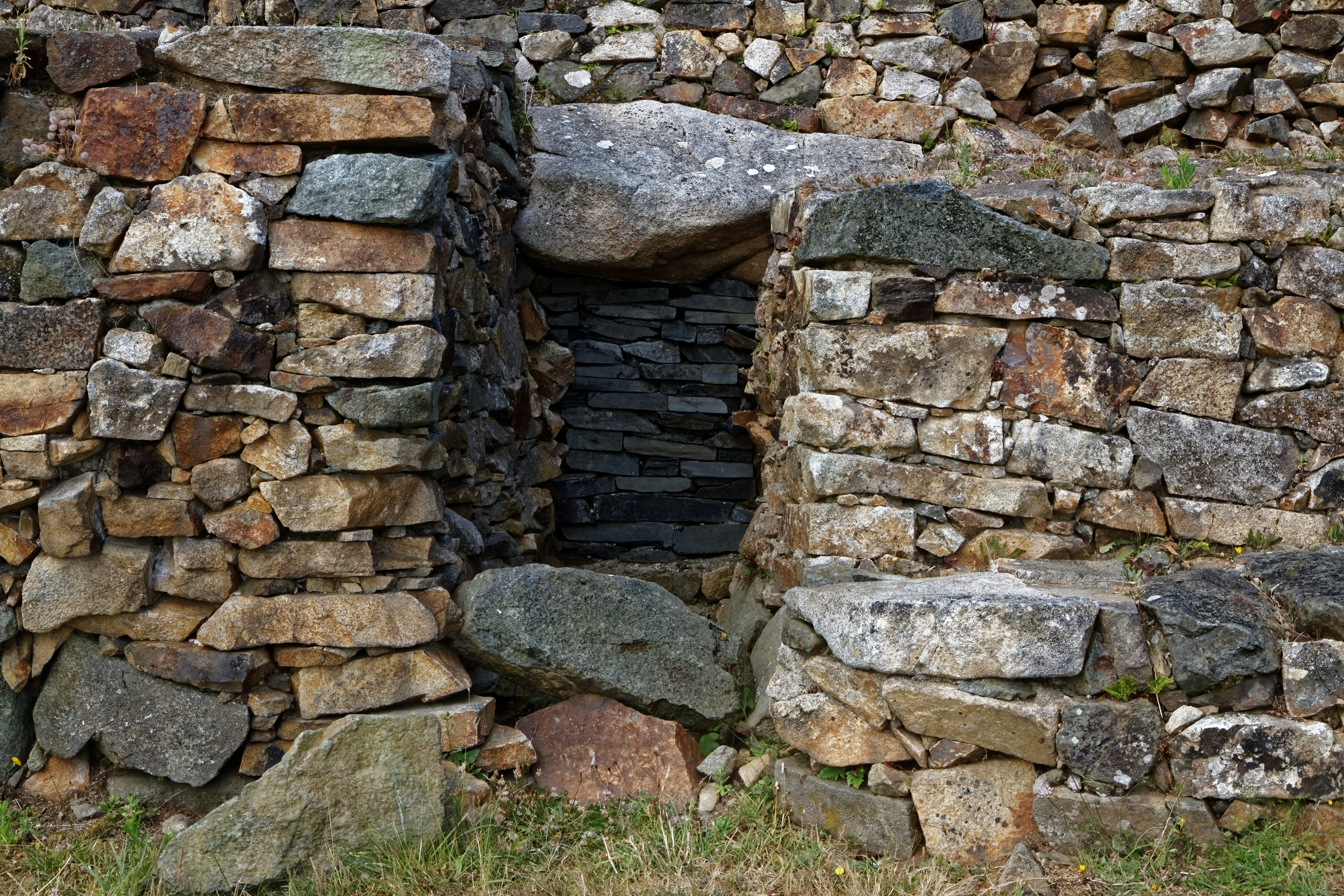 Panorama du Cairn de Barnenez à Plouezoc'h dans le Finistère. .